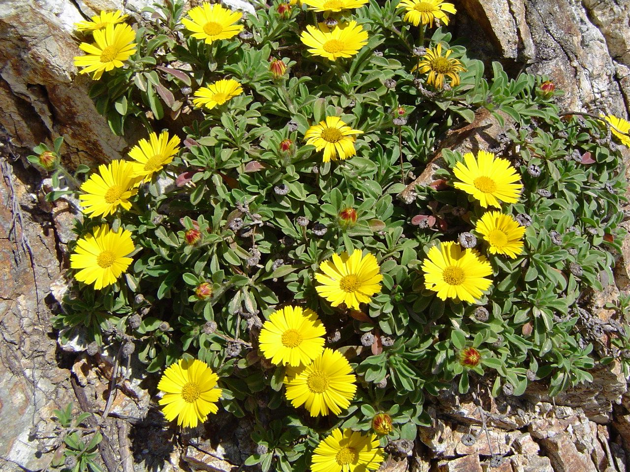 Asteriscus maritimus, Ceuta, NW de África, España